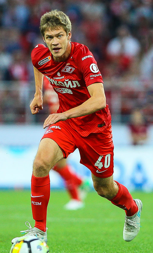 «Спартак» - «Арсенал»